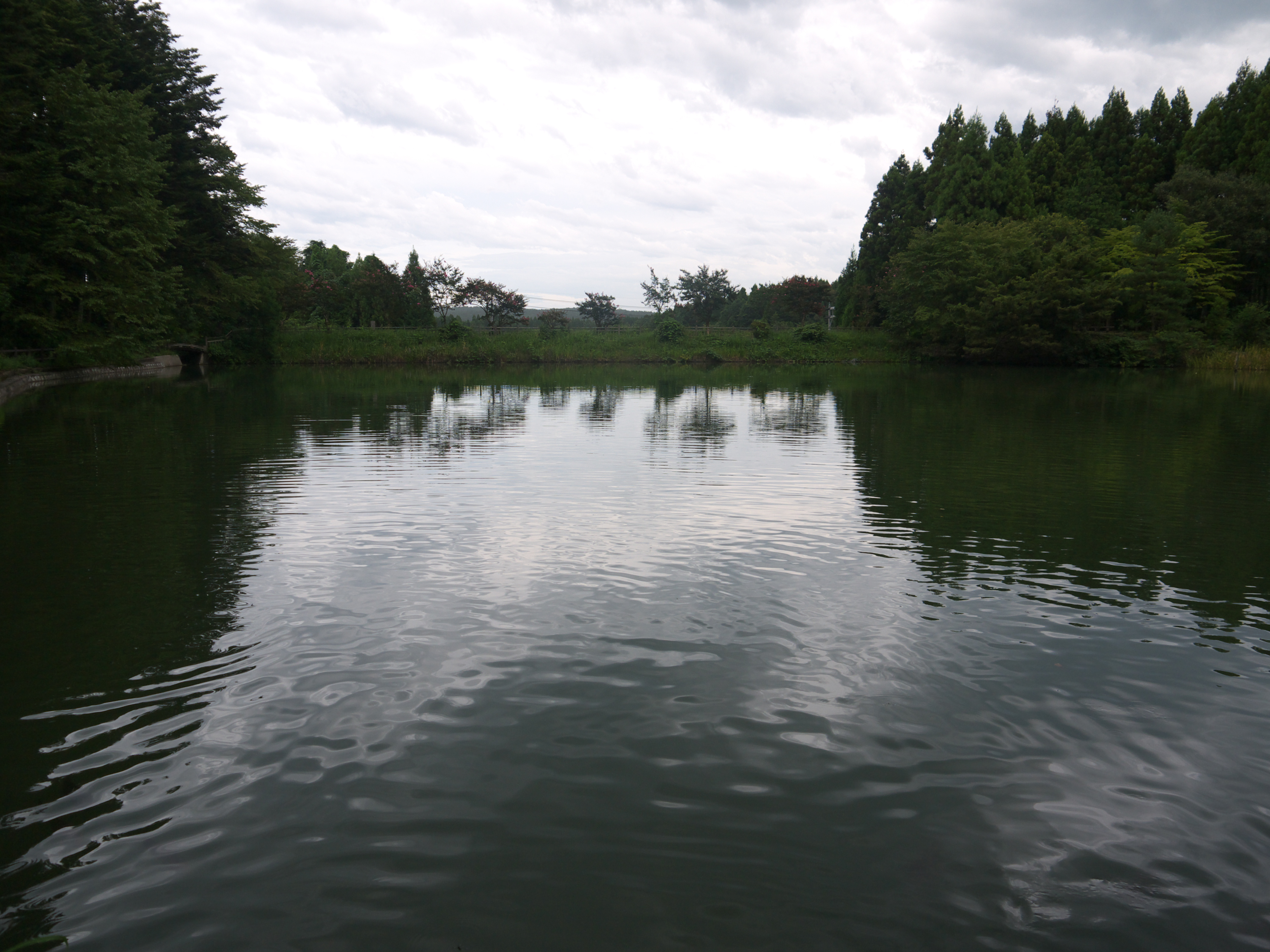 名水百選みなぐち貯水池